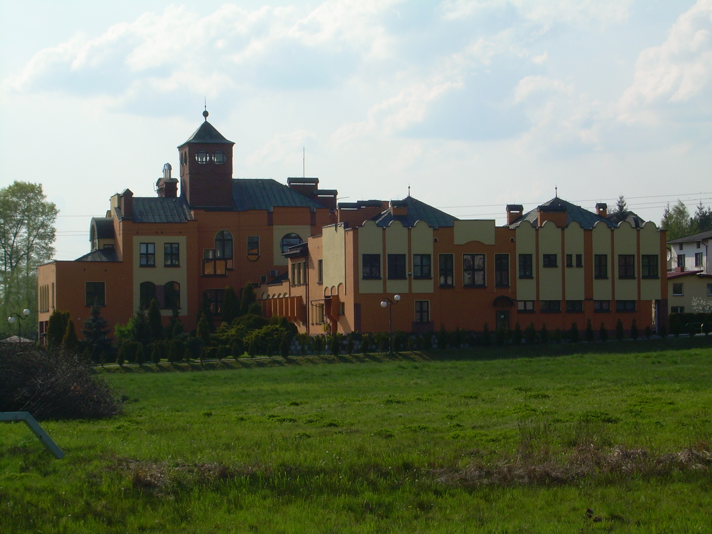 Urząd Gminy w Mszanie